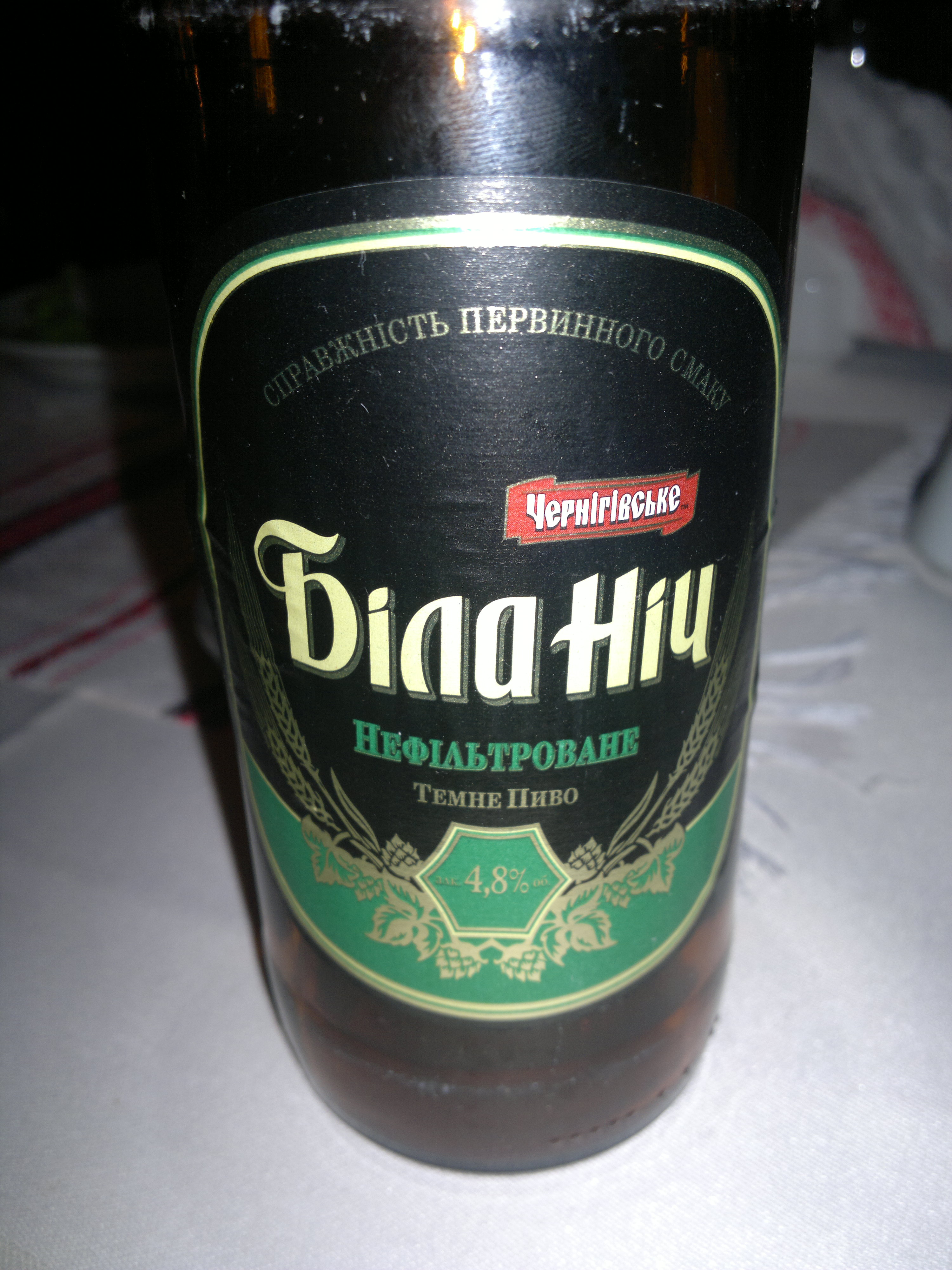 Unfiltered Ukrainian dark beer.